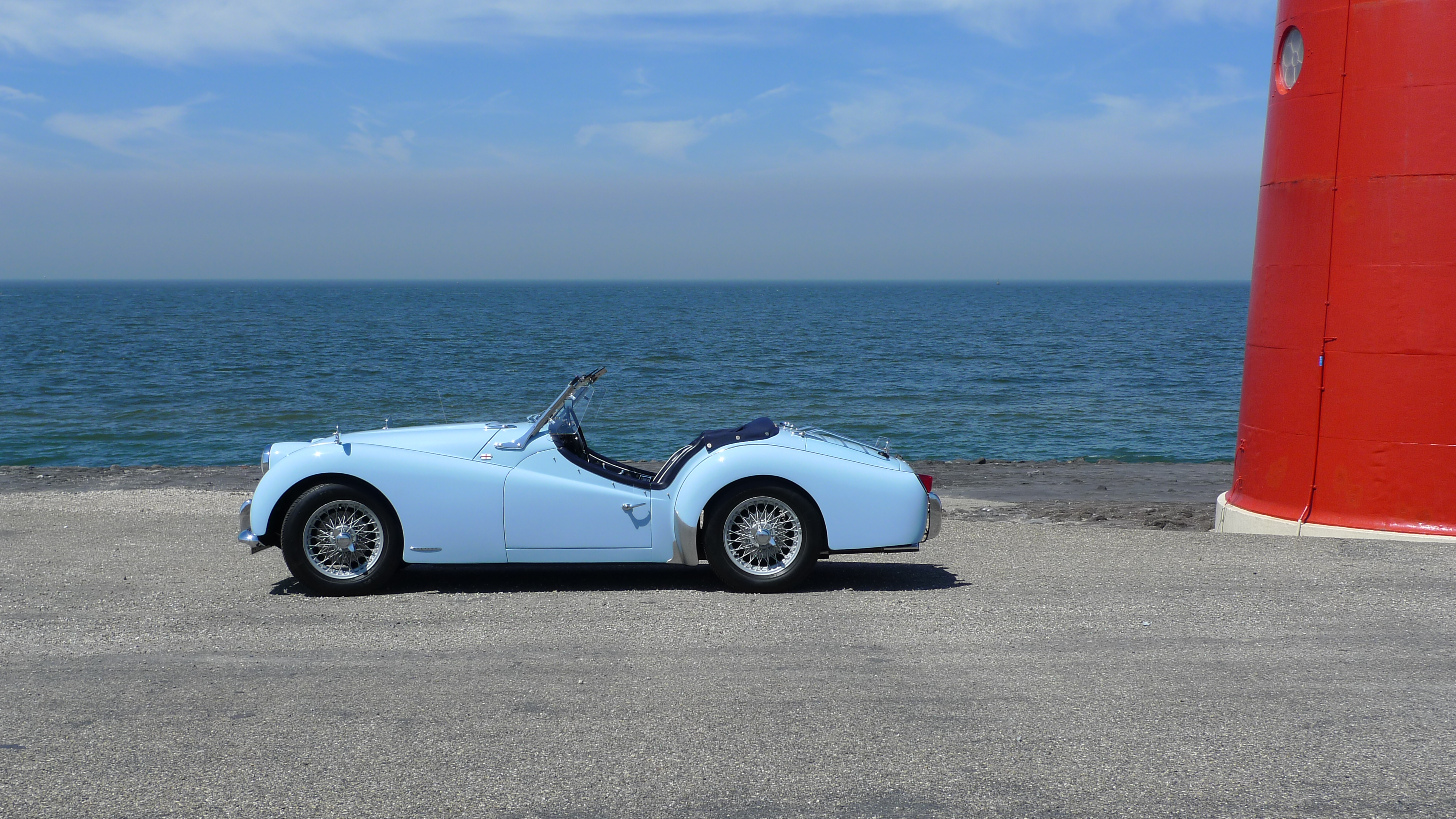 Zomer 2010, het meest westerlijke punt van Nederland met vuurtoren en m'n klassieke Triumph TR3a uit 1959 vormen samen een mooi contrast.